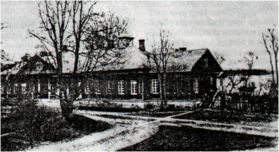 Сядзіба Свідаў у Глівіне.